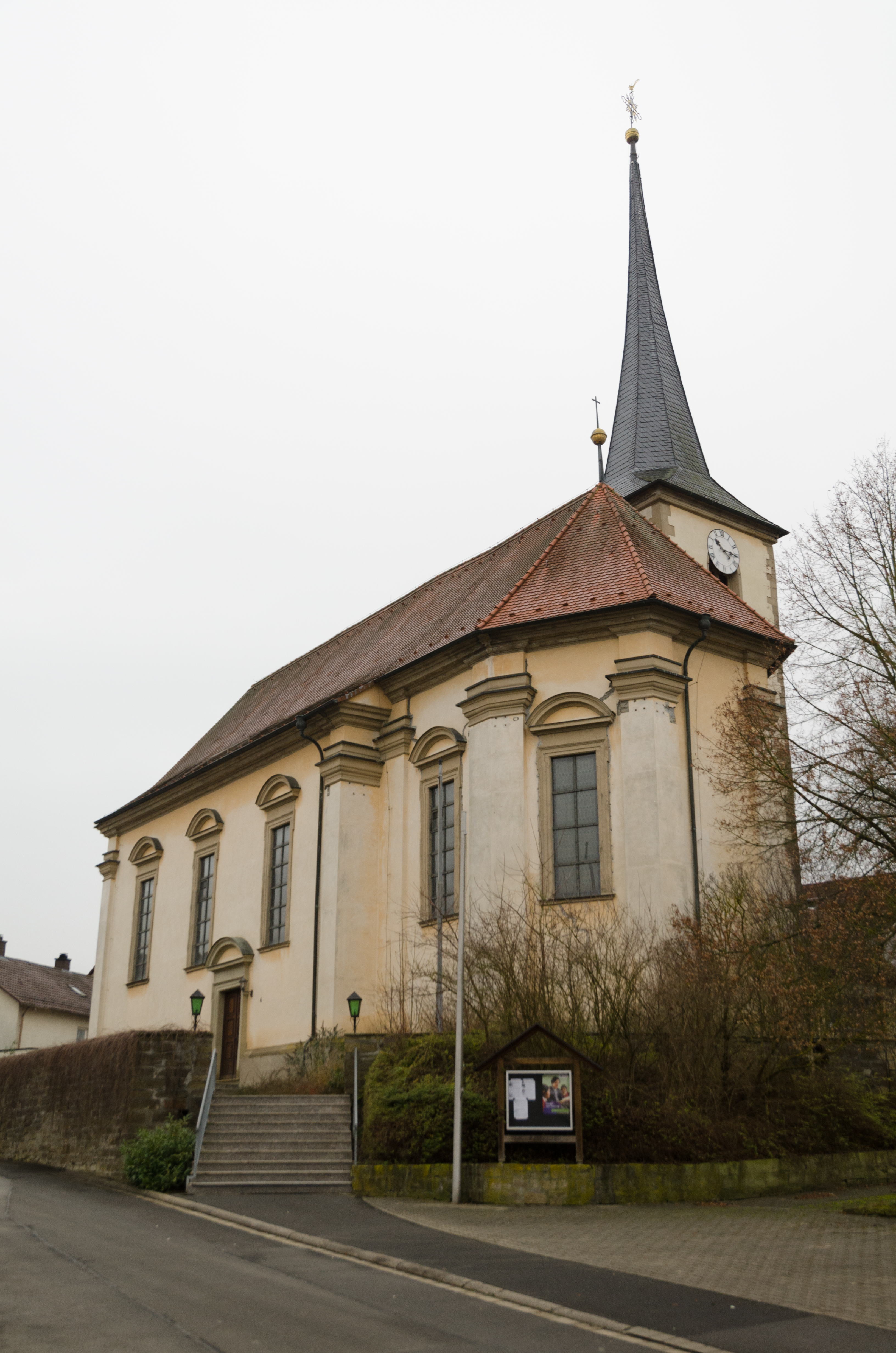 Maßbach, Weichtungen, Katholische Filialkirche St Joseph